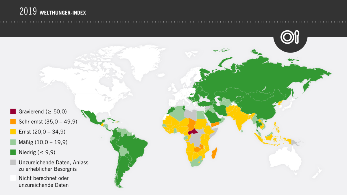 Landkarte WHI 2019